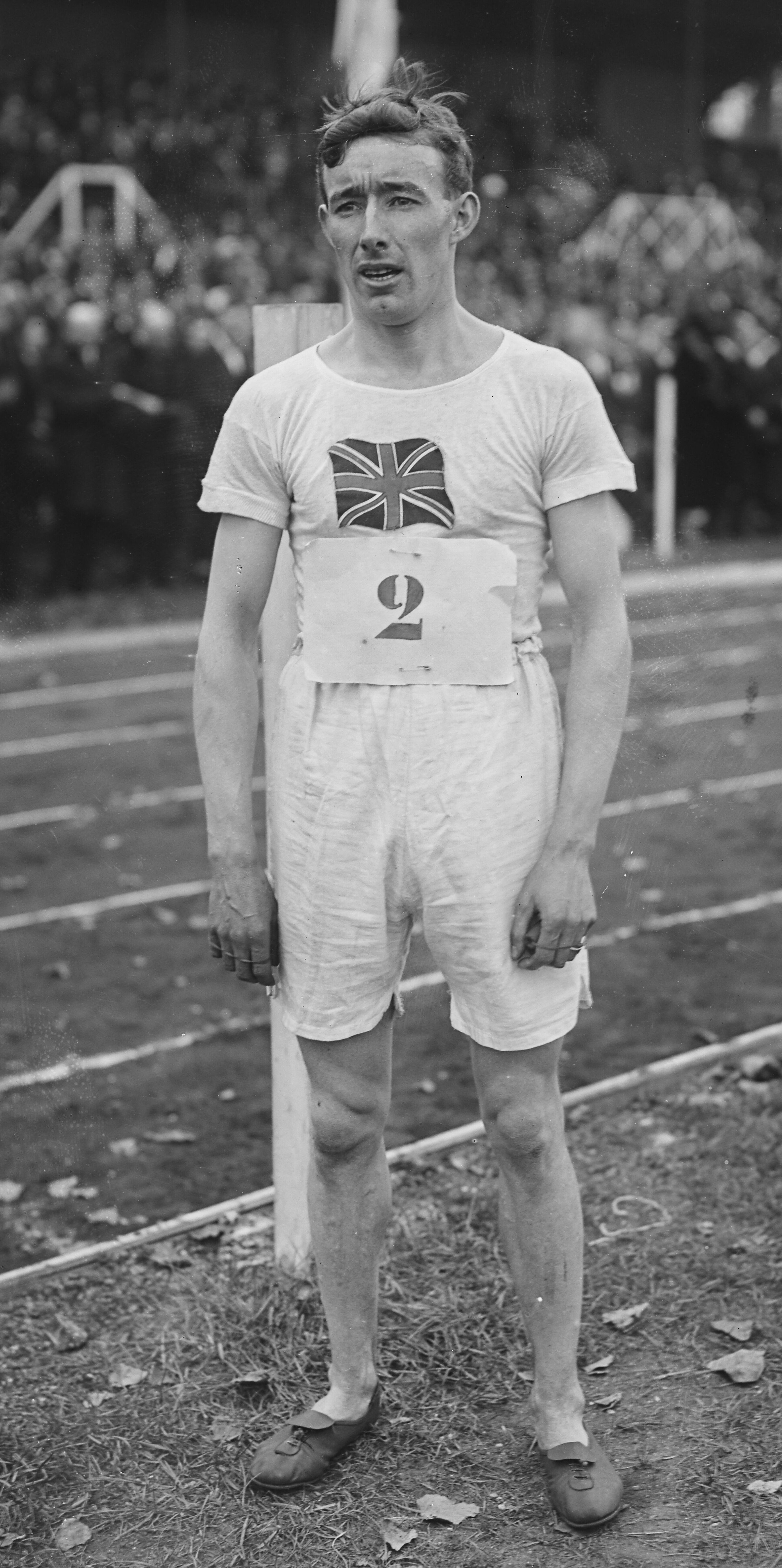 Colombes, 1/11/21, Blewitt, gagnant [du] prix Jean Bouin [5000 m] : [photographie de presse] / [Agence Rol]